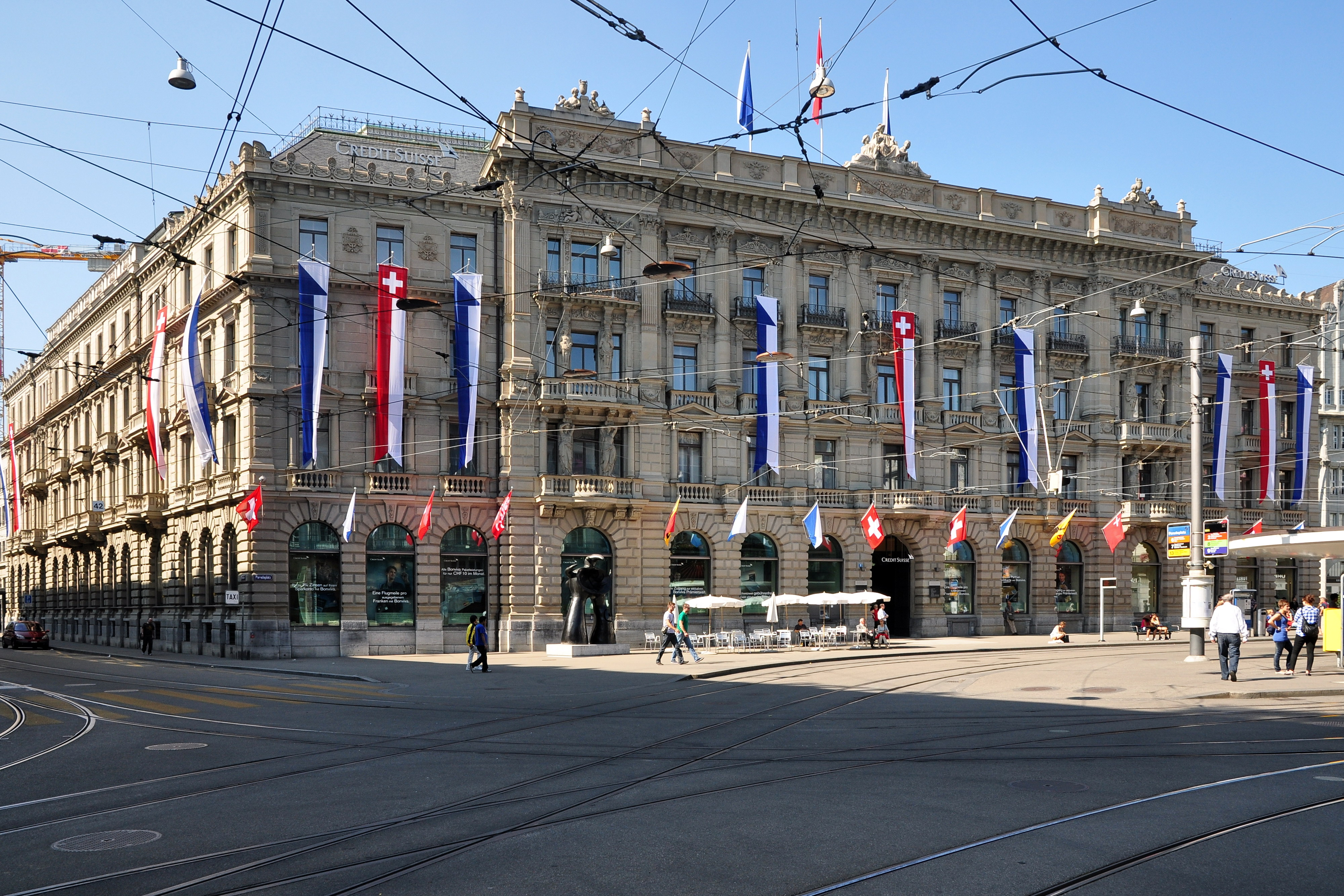 Credit Suisse, Paradeplatz in Zürich (Switzerland)